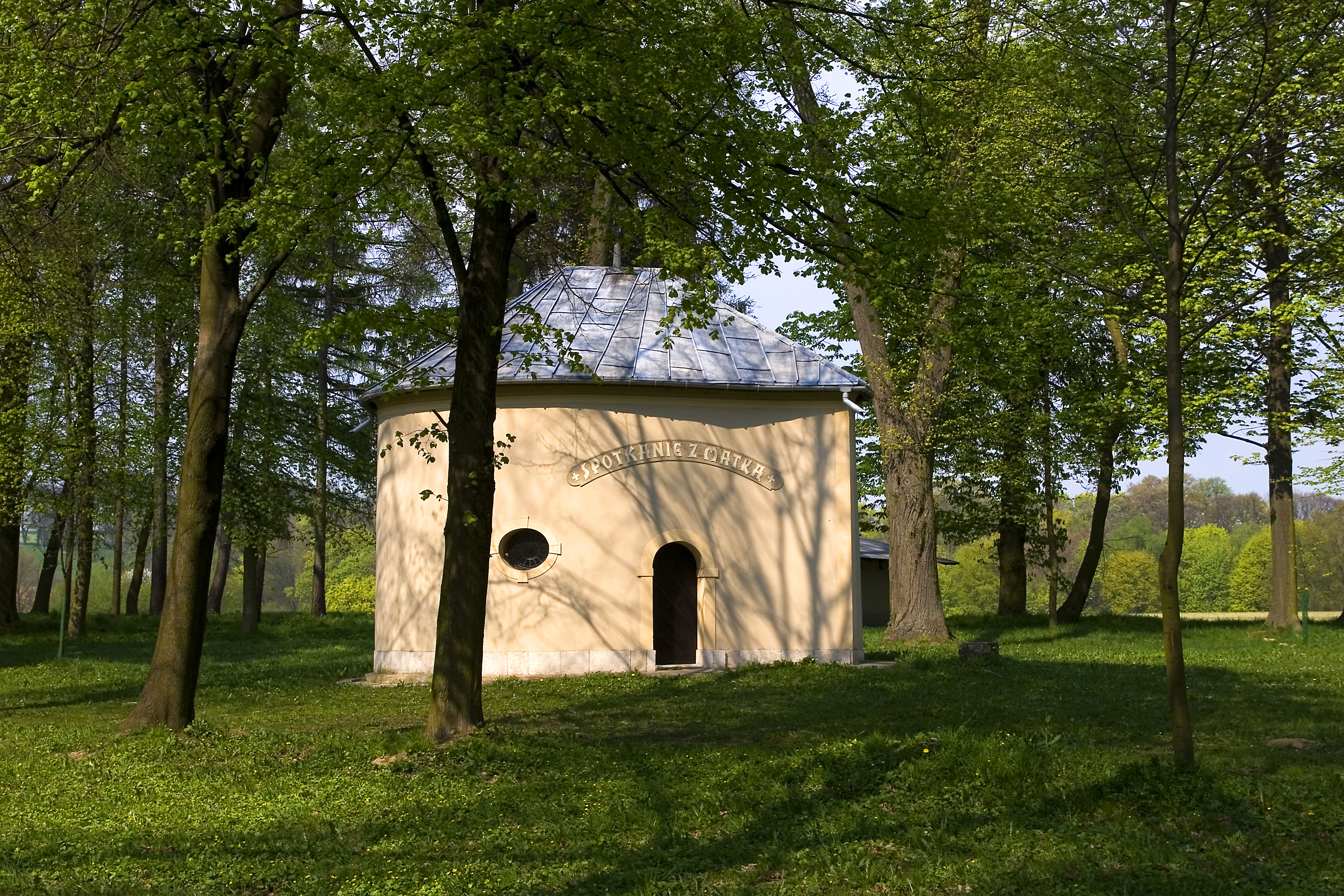 Góra św. Anny, kaplica Spotkanie z Matką, Gmina Leśnica, powiat strzelecki